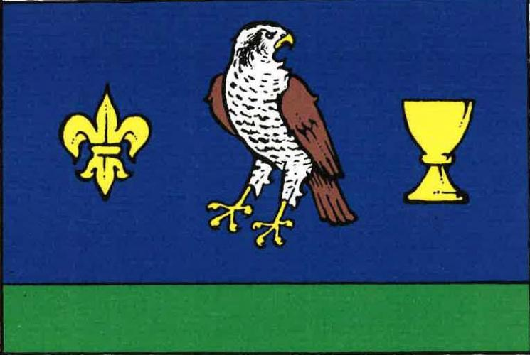 vlajka, Jestřabí Lhota, okres Kolín